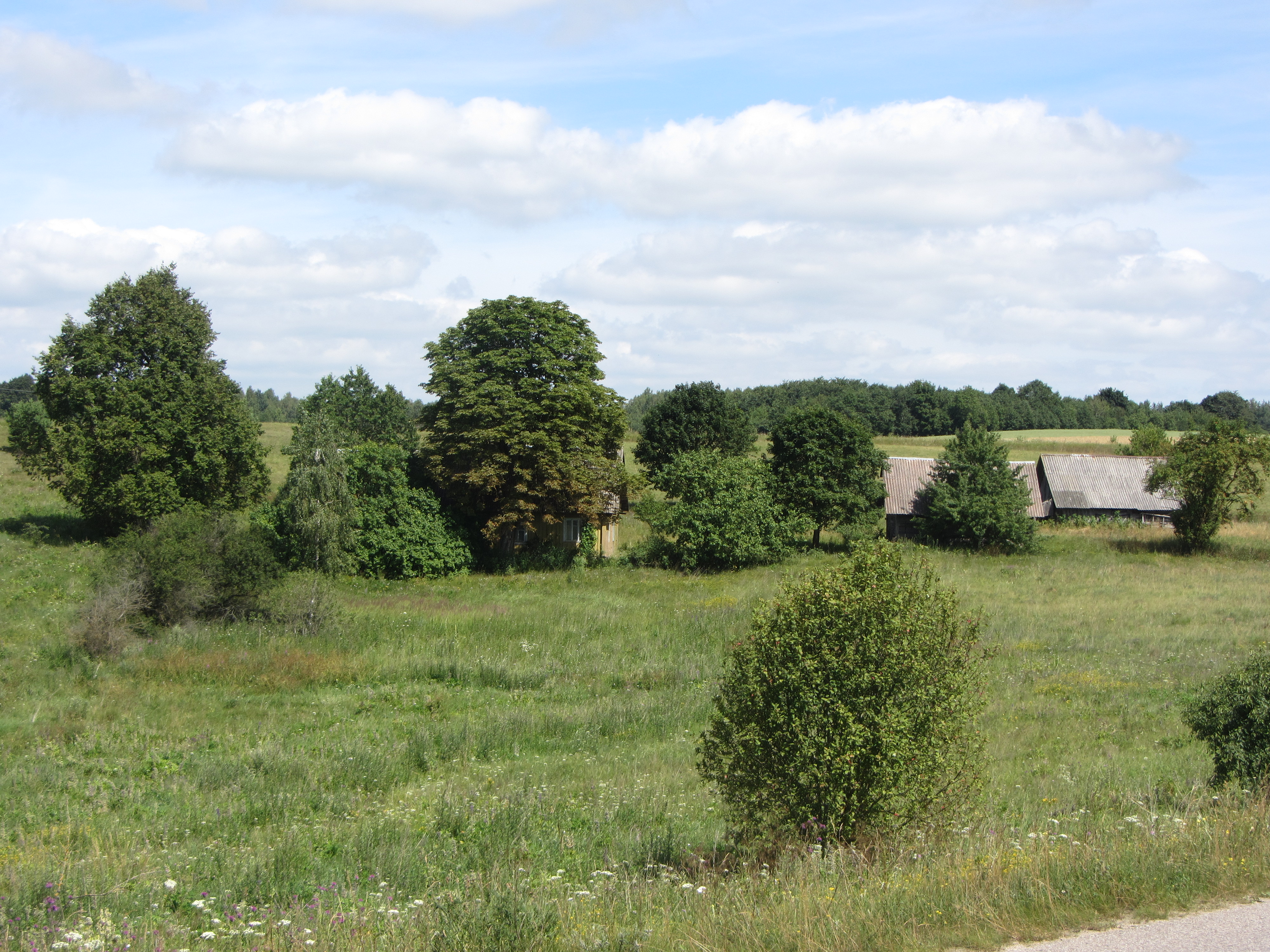 Luokesos sen., Lithuania